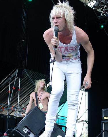 Azkena Rock Festival (Vitoria)